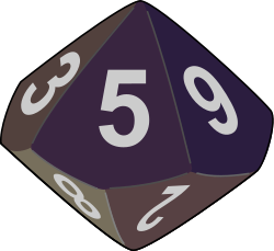 Dice